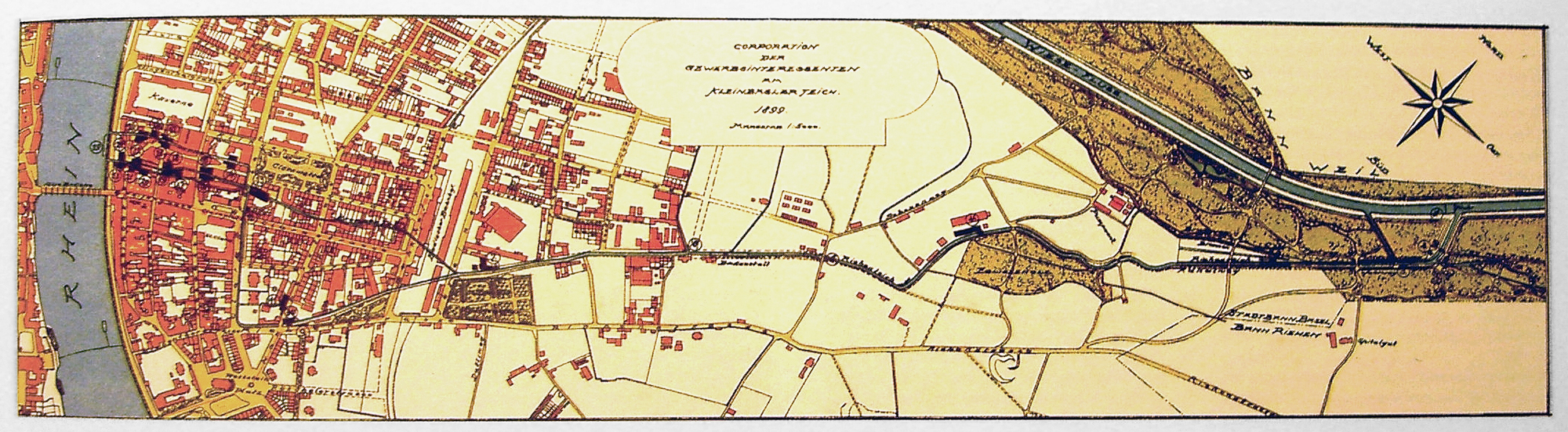 Plan der Kleinbasler Teiche